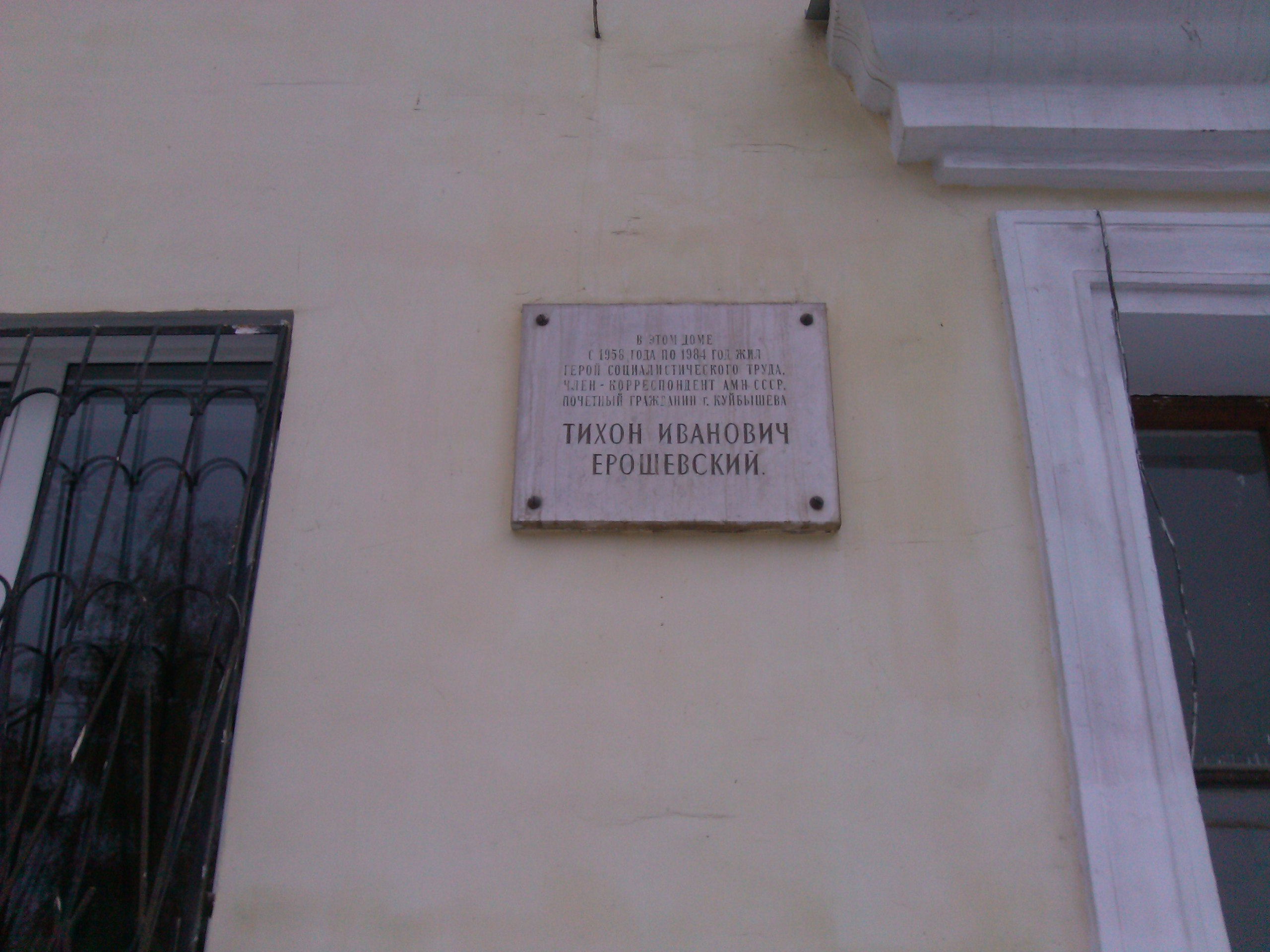 Мемориальная табличка, посвящённая Т. И. Ерошевскому